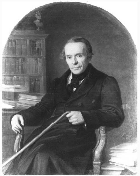 Bildnis August Kahlert (1807–1864), Gemälde von Ernst Resch (1807–1864)